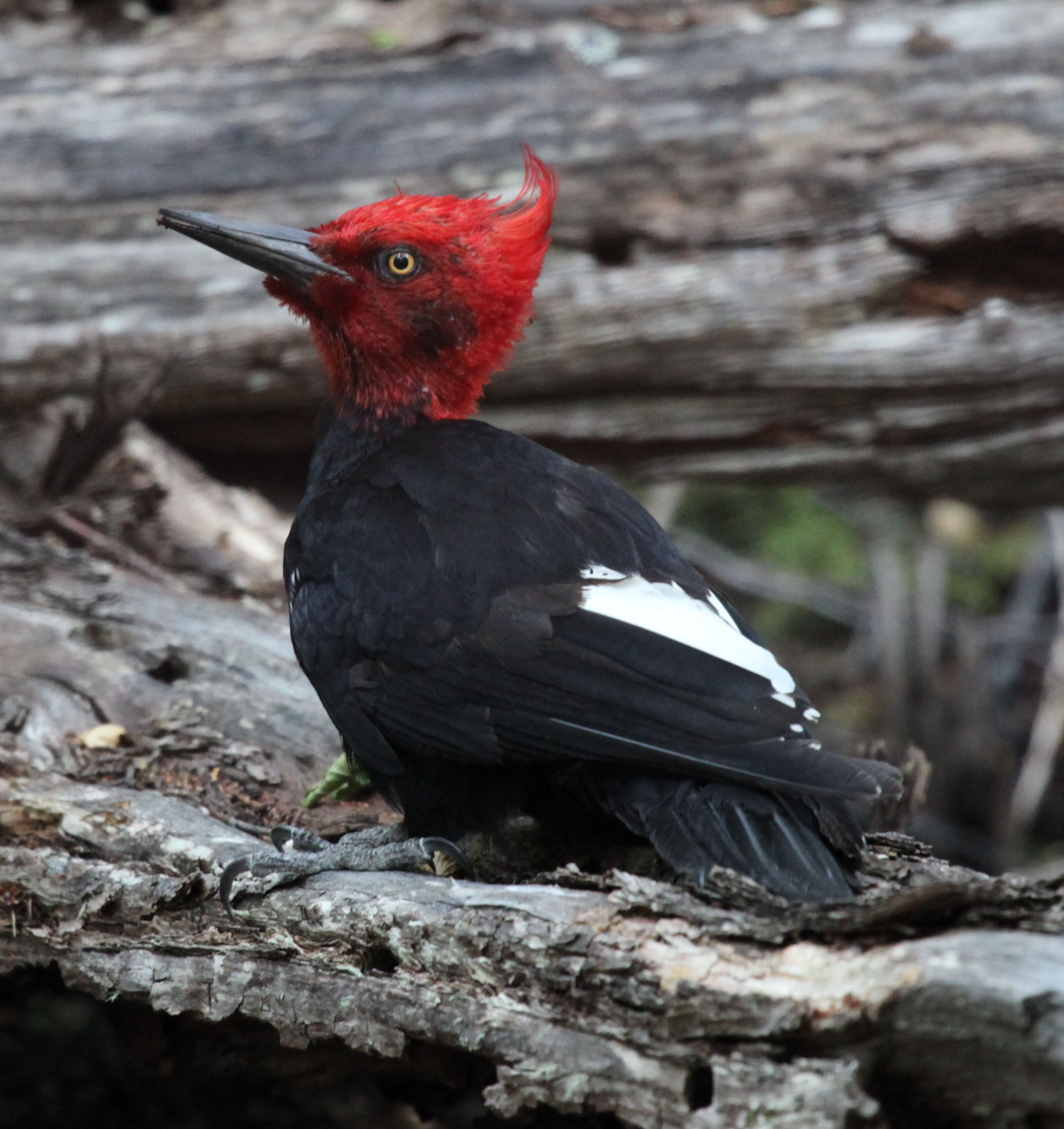 In Tierra del Fuego National Park, Argentina.